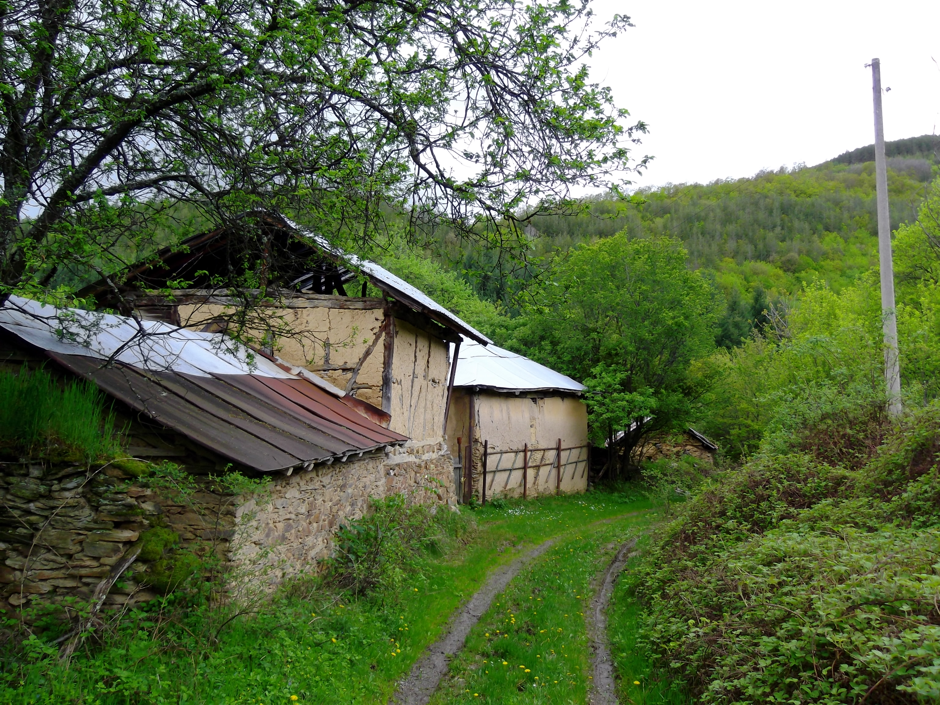 Махала Радова ливада в село Лесковдол.